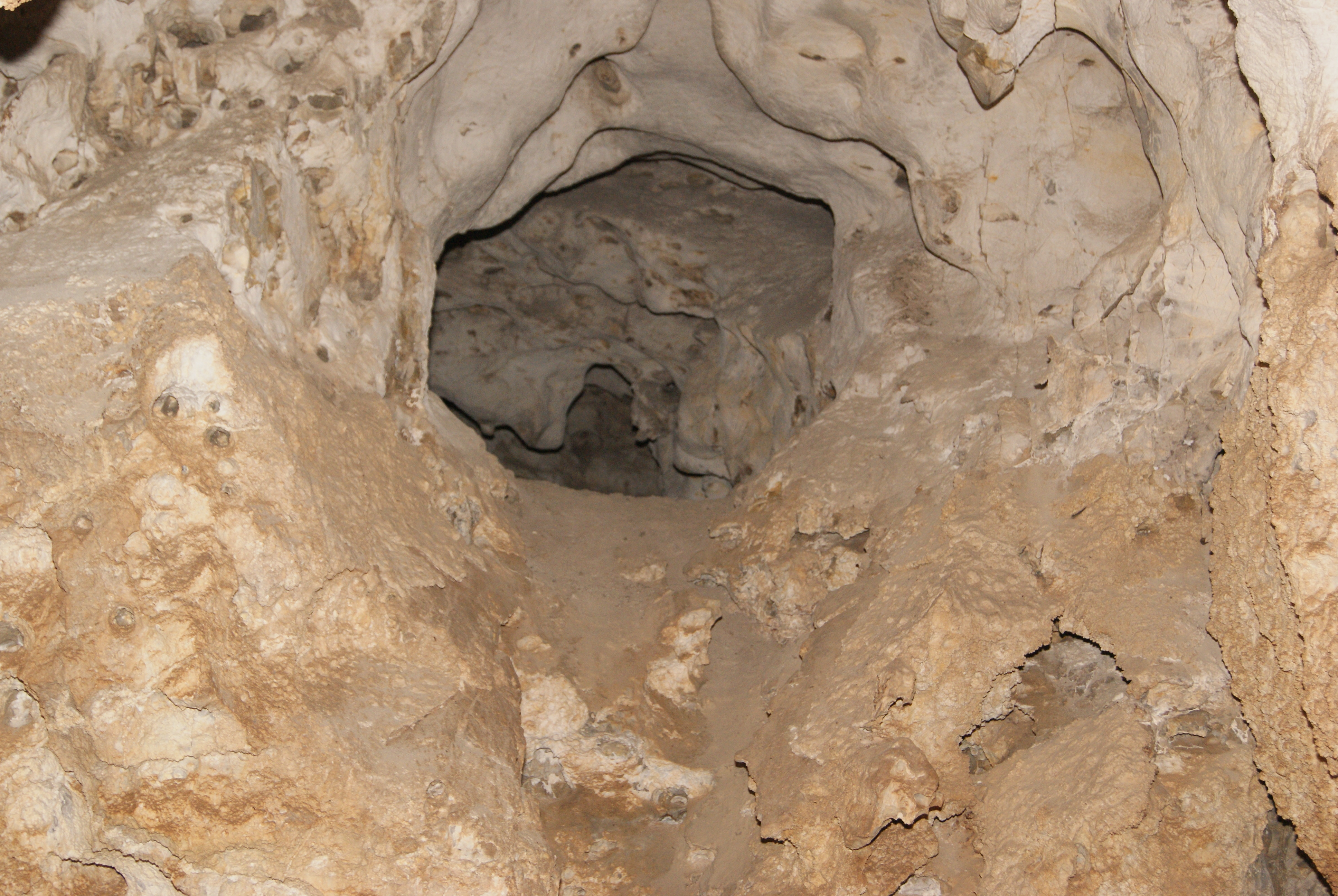 در کل همه جای غار مسیر هایی هستن که با یکدیگر در ارتباط هستن باید مواظب باشین گم نشوید